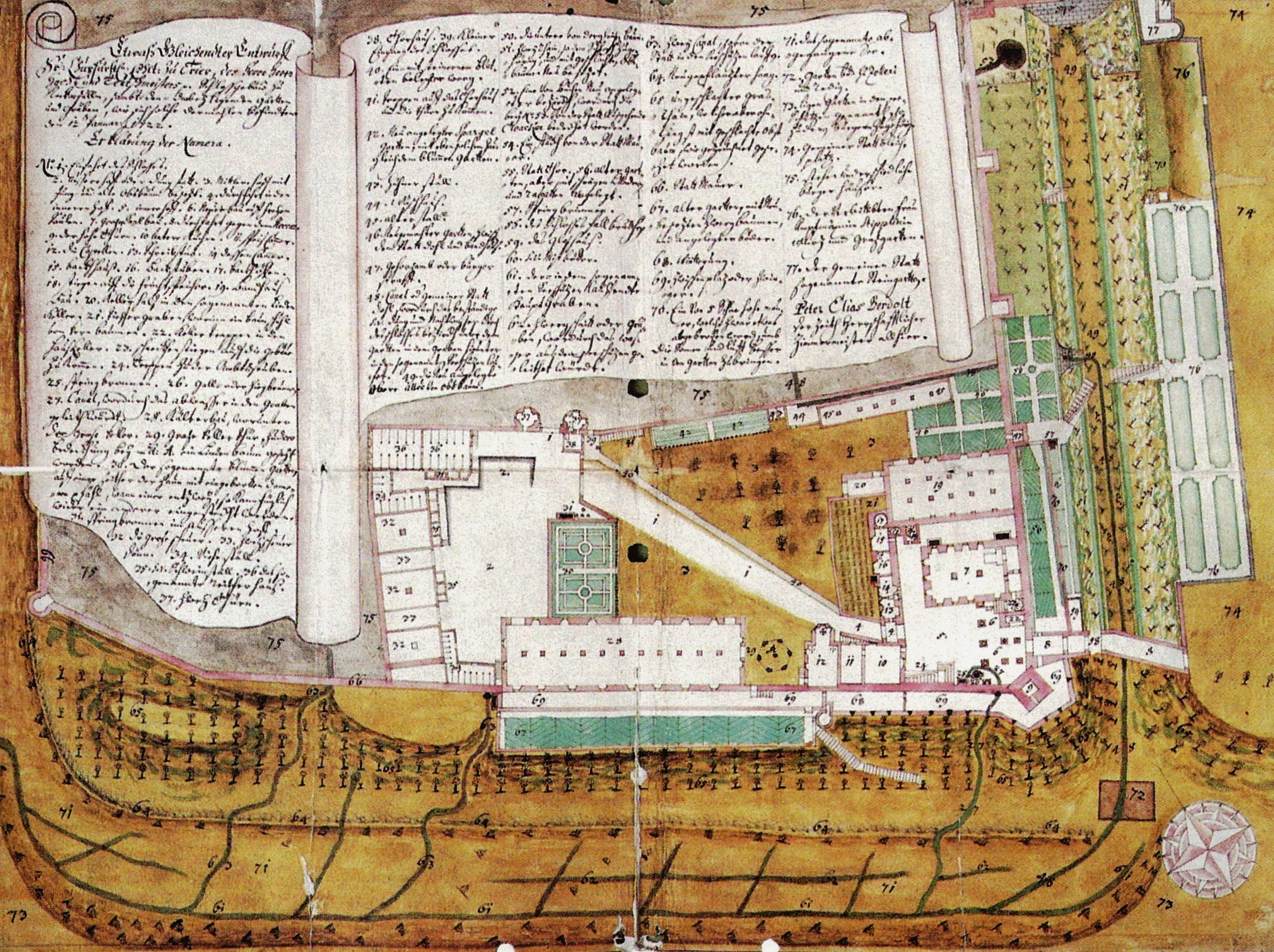 „Grundriß des Deutschordensschlosses Neckarsulm mit allen Gebäuden, Gärten usw.“